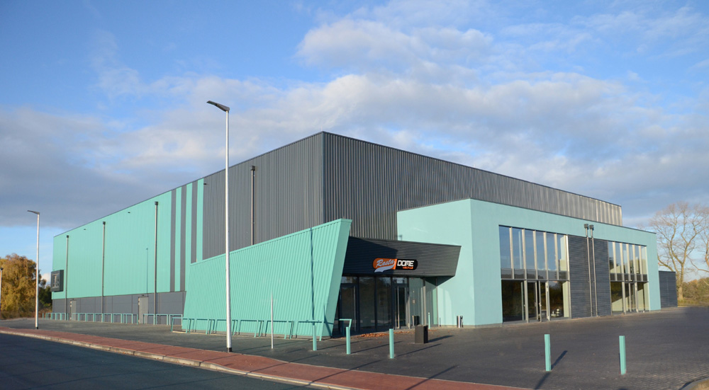 Rasta Dome